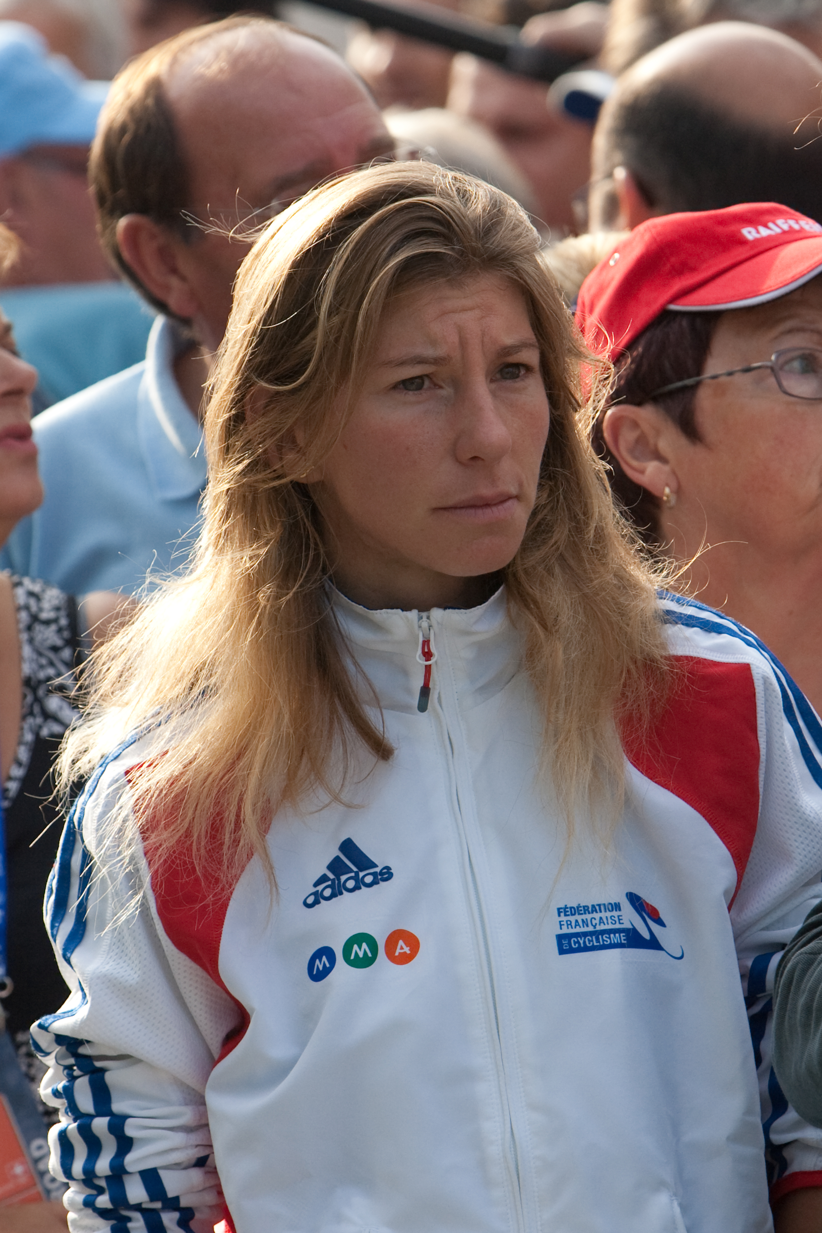 Christel Ferrier-Bruneau lors des championnats du monde de cyclisme à Mendrisio en 2009